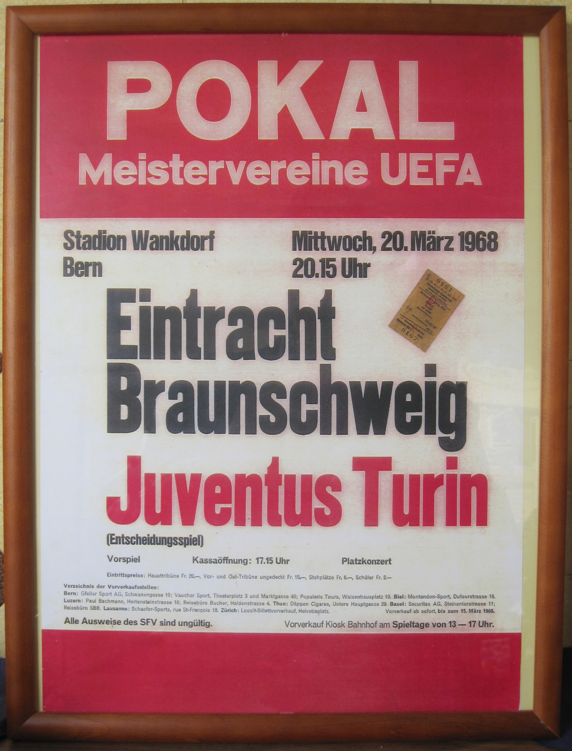 Ankündigungsplakat für das Entscheidungsspiel zwischen Eintracht Braunschweig und Juventus Turin am 20. März 1968 im Stadion Wankdorf, Bern, im Viertelfinale des Europapokals der Landesmeister 1967/68. Bei Eintrittspreisen zwischen 20 SFr (Haupttribüne) und 2 SFr (Schüler) waren 44.700 Zuschauer im Stadion anwesend. Außerdem hinter dem Bildrahmenglas zu sehen: Fahrkarte (Paginiernummer „0187”) für den „Verwaltungs-Sonderzug” für die Strecke „Braunschweig Hbf – Bern – via Basel – und zurück”; sie kostete 83 DM.